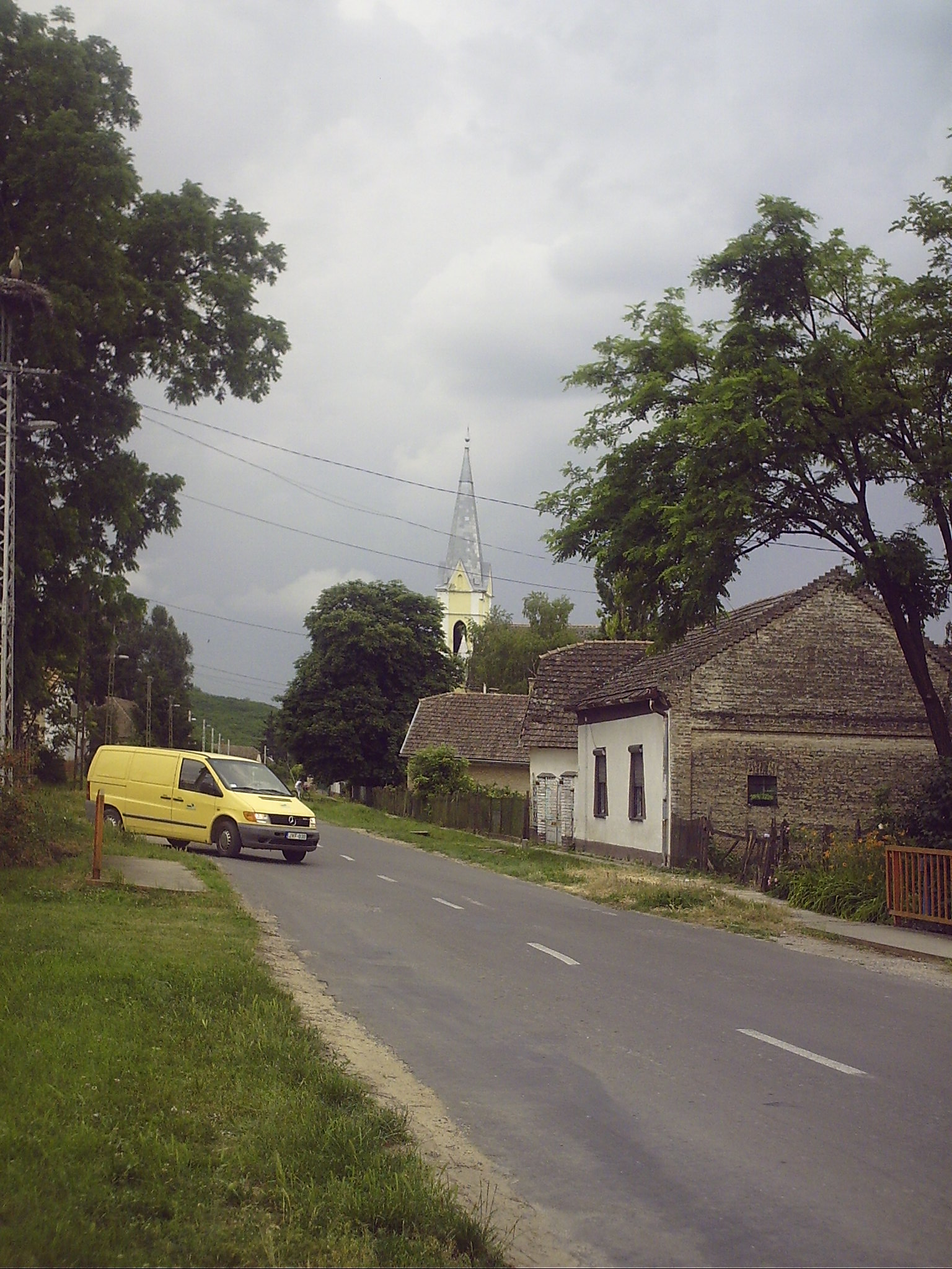 Belecska Fő utca látkép